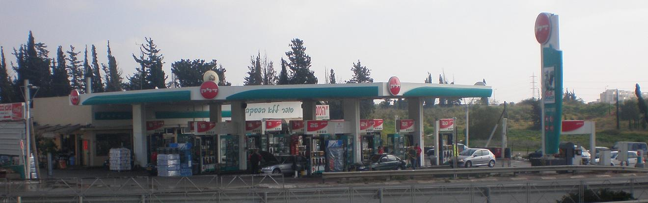 Delek petrol station, Israel.